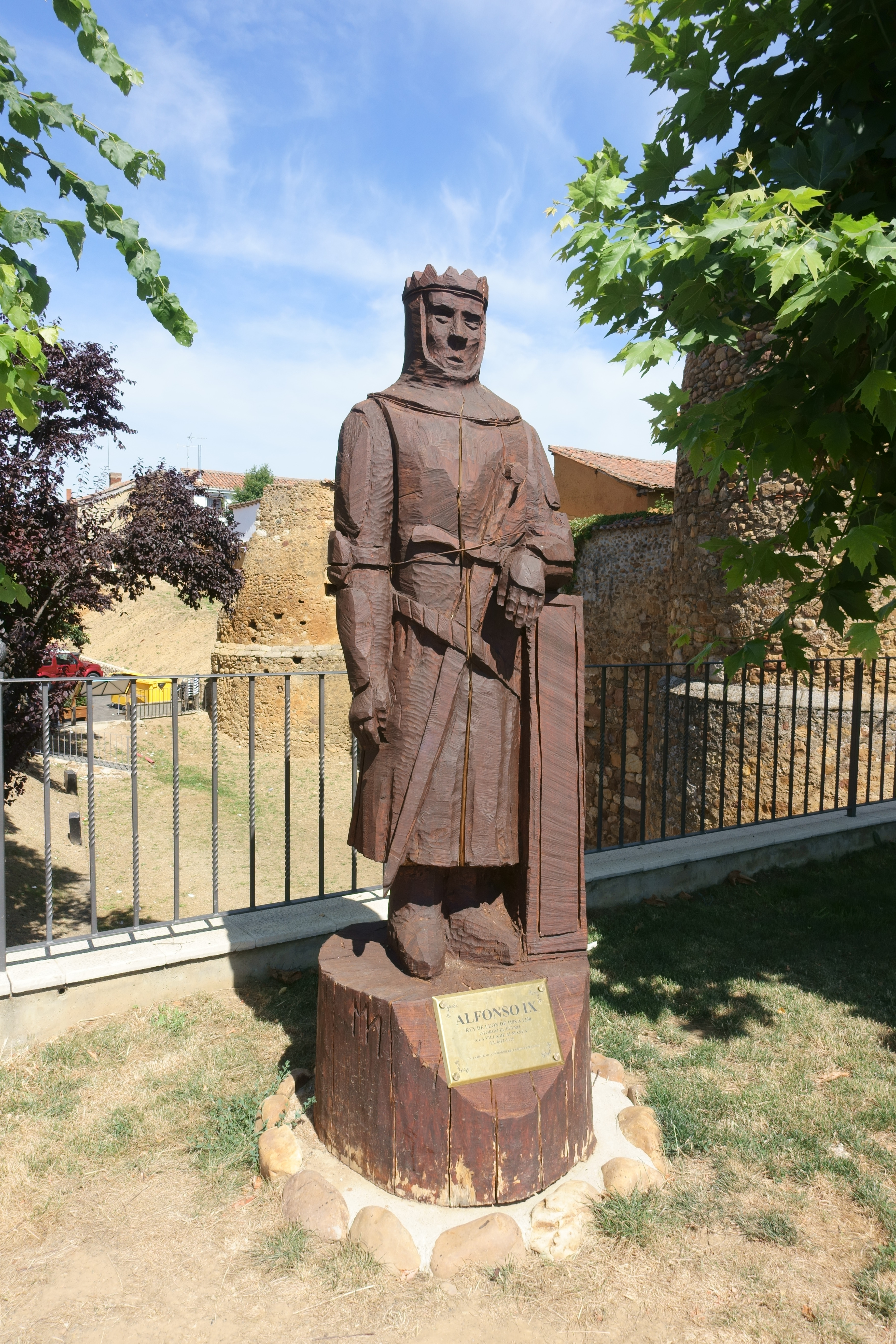 Escultura dedicada a Alfonso IX de León en Almanza (León, España).